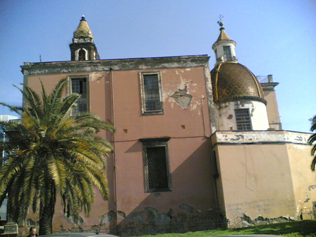 Esterno, Santa Maria di Portosalvo, Napoli